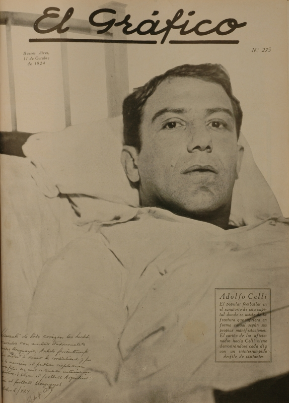 11 de octubre de 1924. Adolfo Celli recuperándose de la lesión siendo aún Futbolista de Newell's Old Boys. Primera Tapa de El Gráfico con un futbolista del Interior